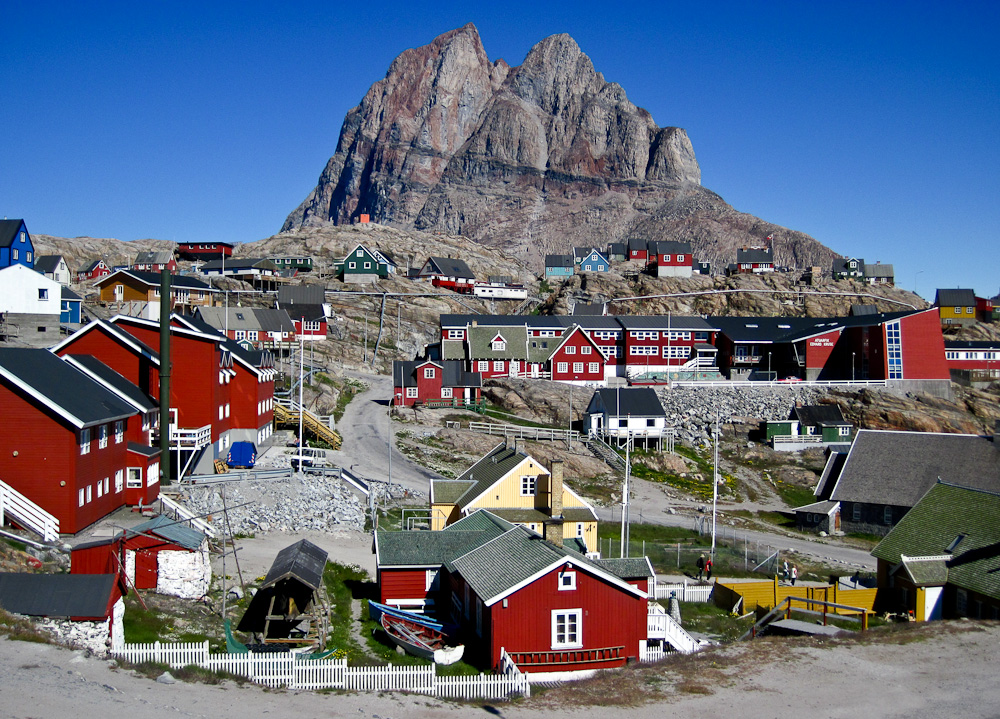 Umanaq, Westgrönland